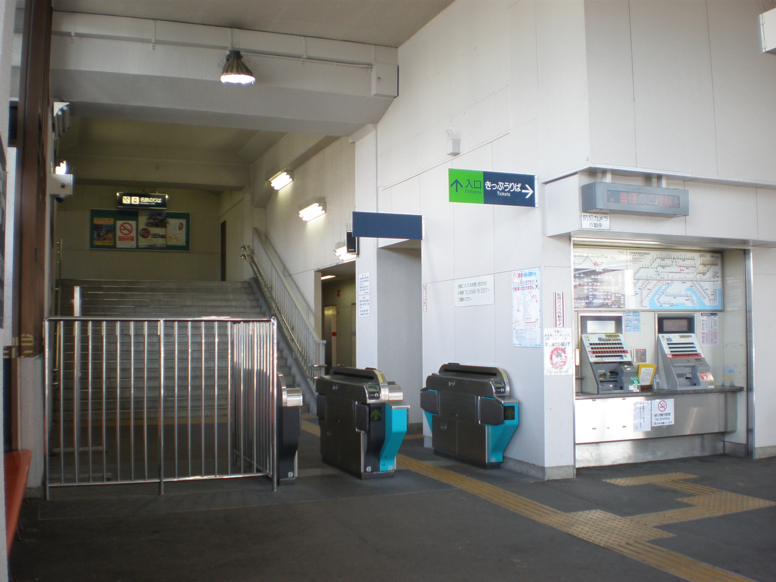 愛知県小牧市にある味岡駅改札口